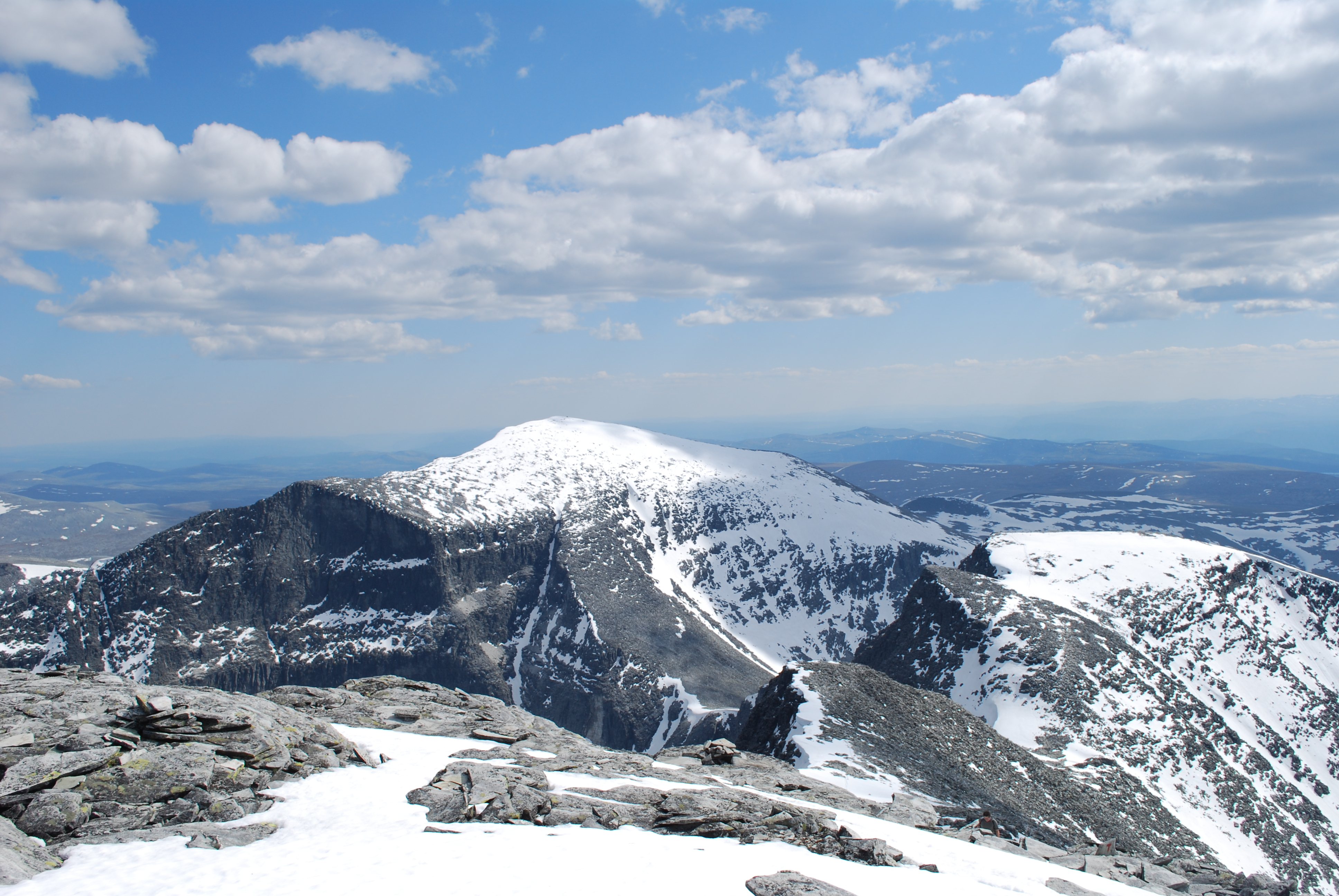 Storronden (2138 moh) til venstre og Vinjeronden (2044 moh) til høyre, sett fra Rondslottet.